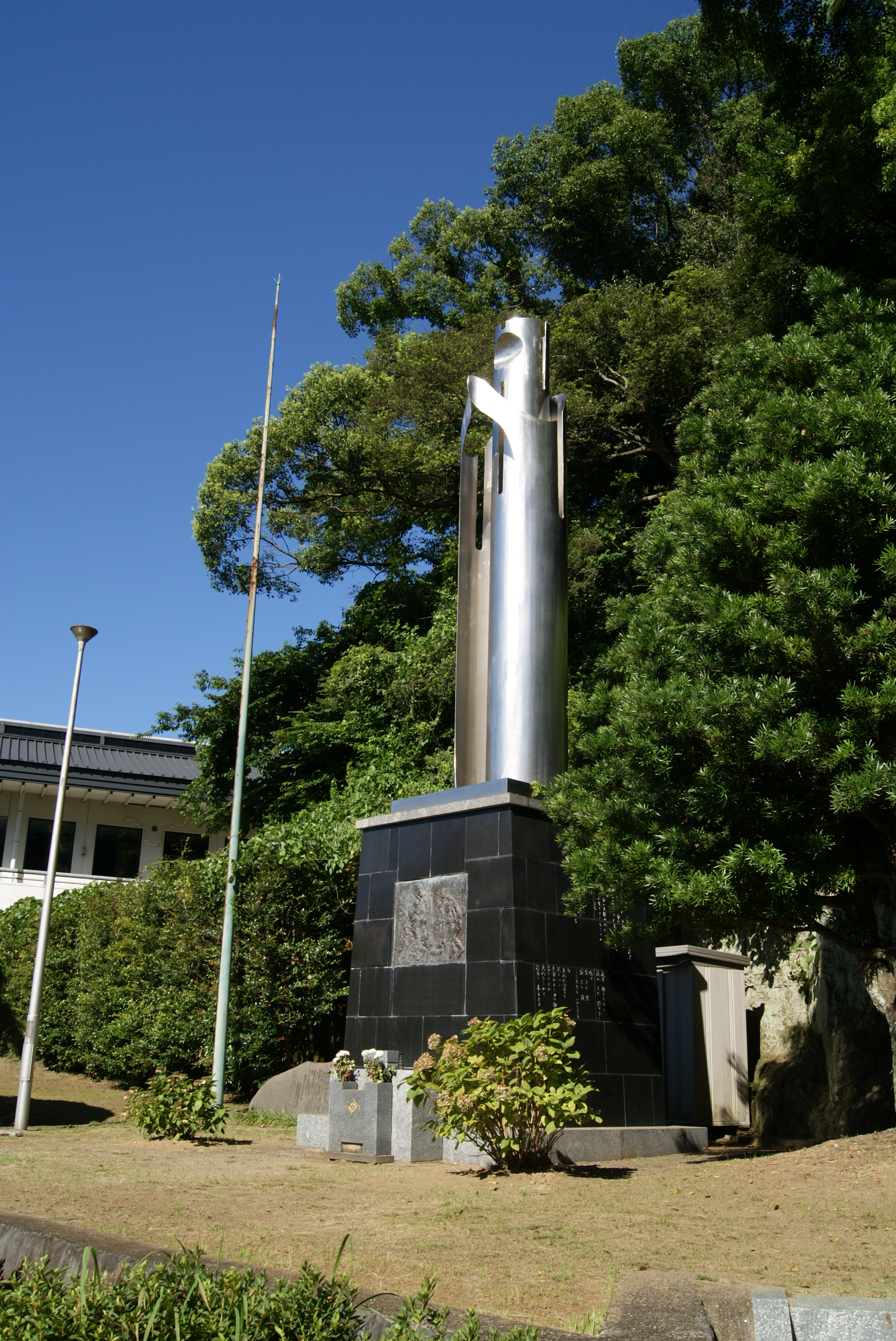 佐世保空襲犠牲者慰霊碑